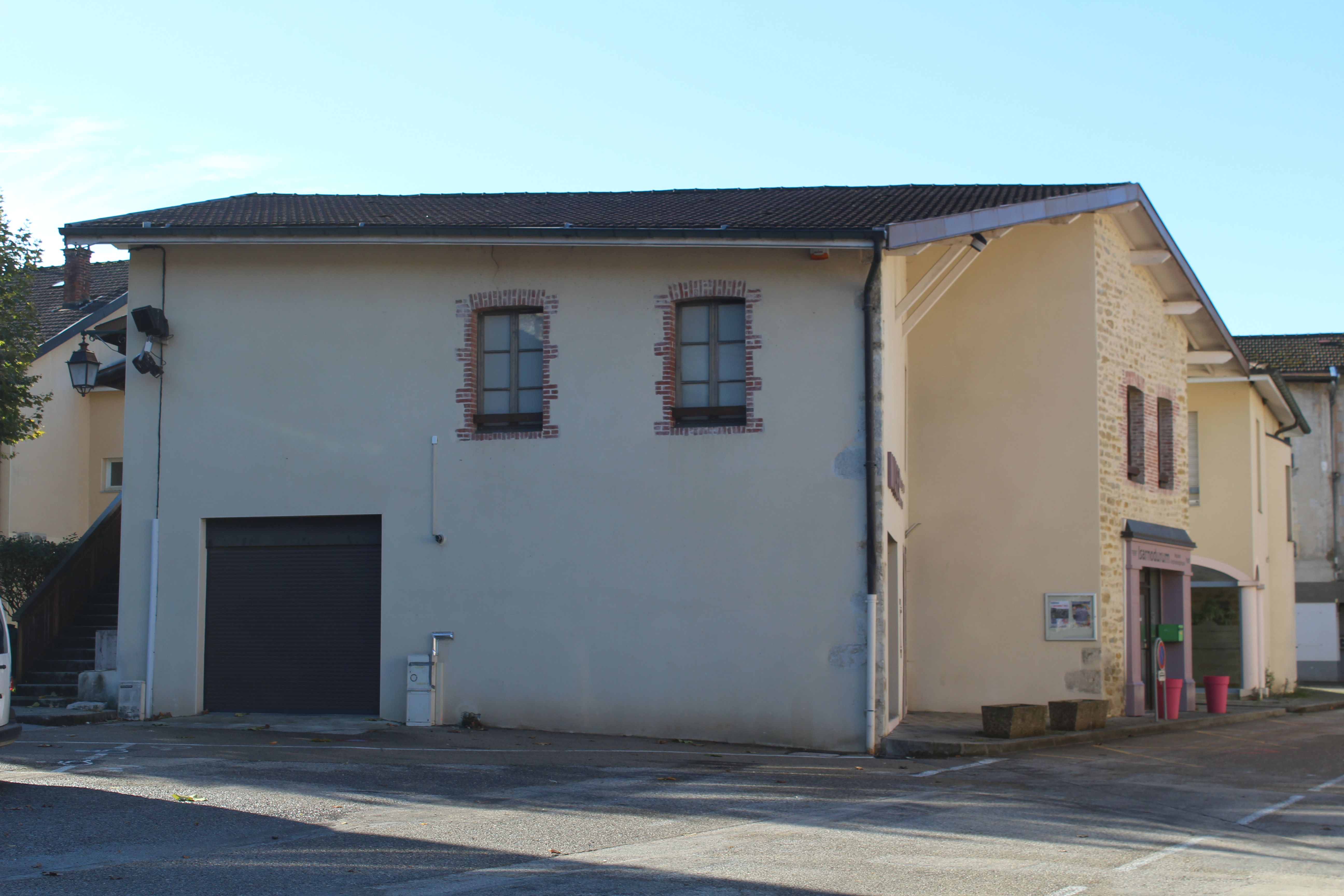 Musée archéologique d'Izernore.